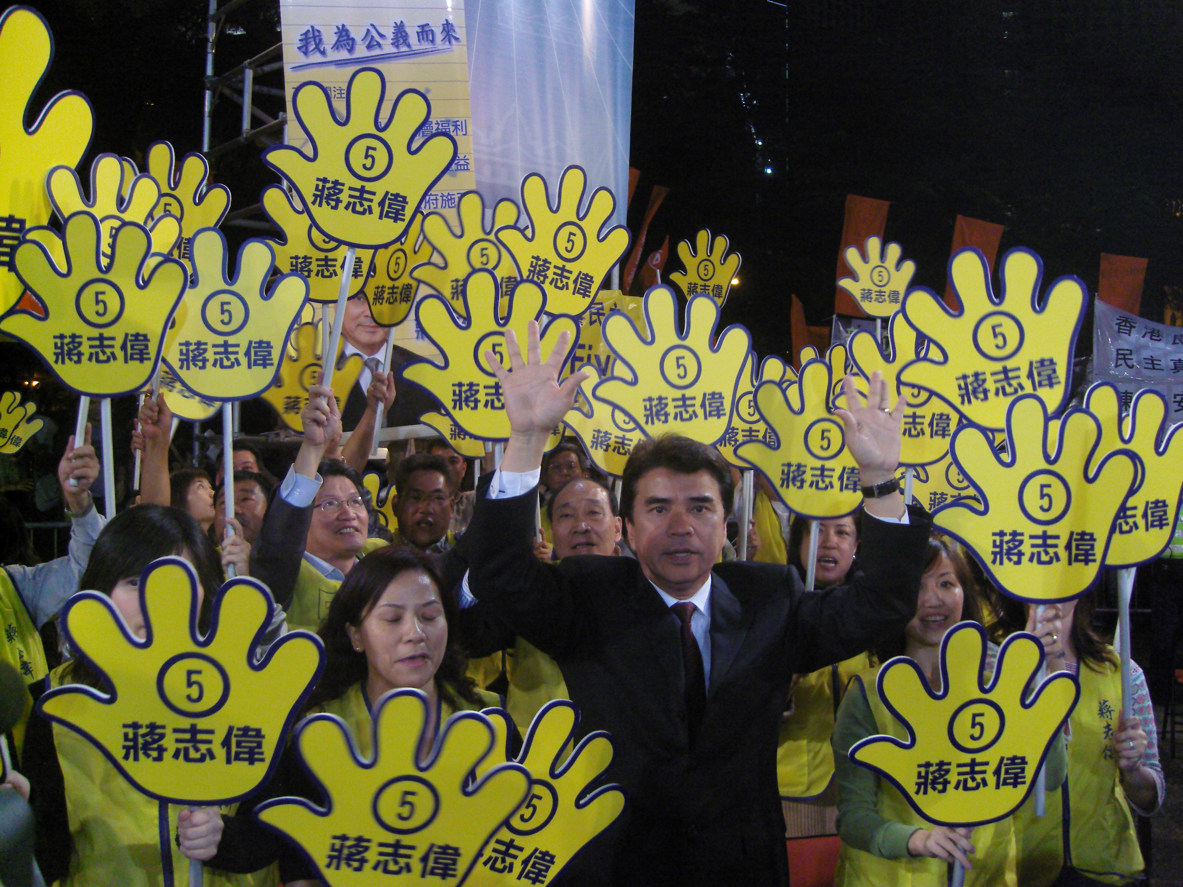 香港立法會港島區補選八大傳媒選舉論壇。